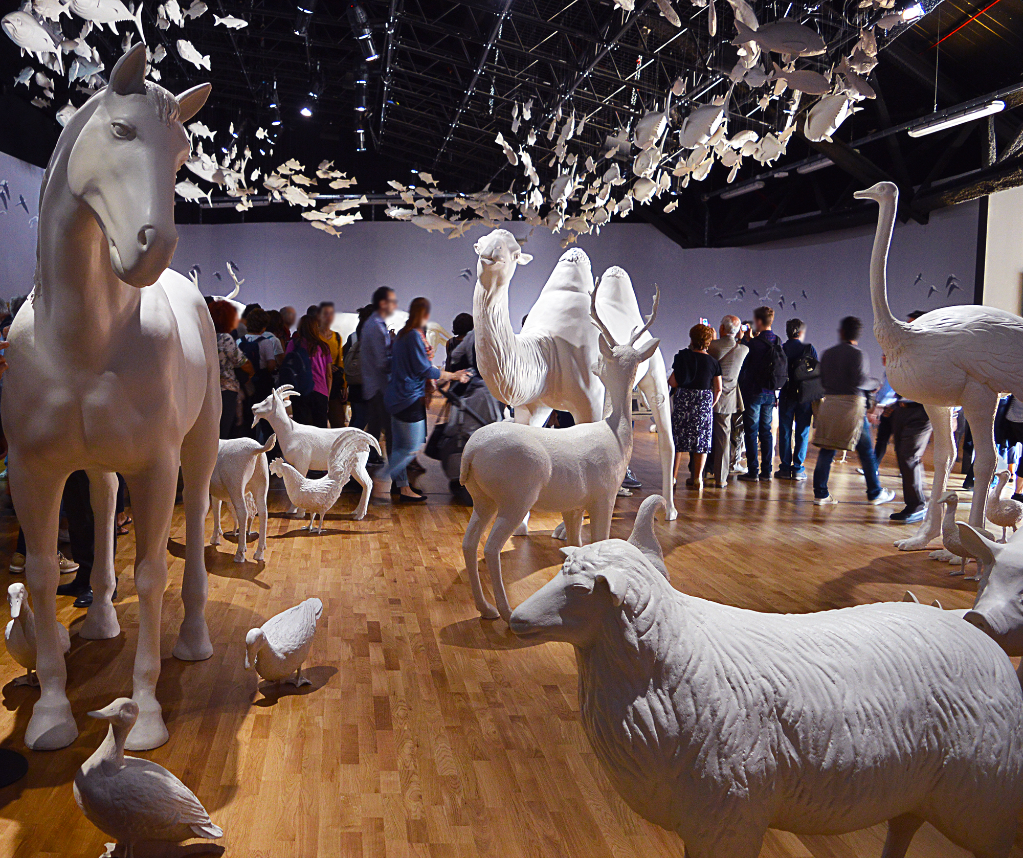 La sala degli animali al Padiglione Zero di EXPO Milano 2015